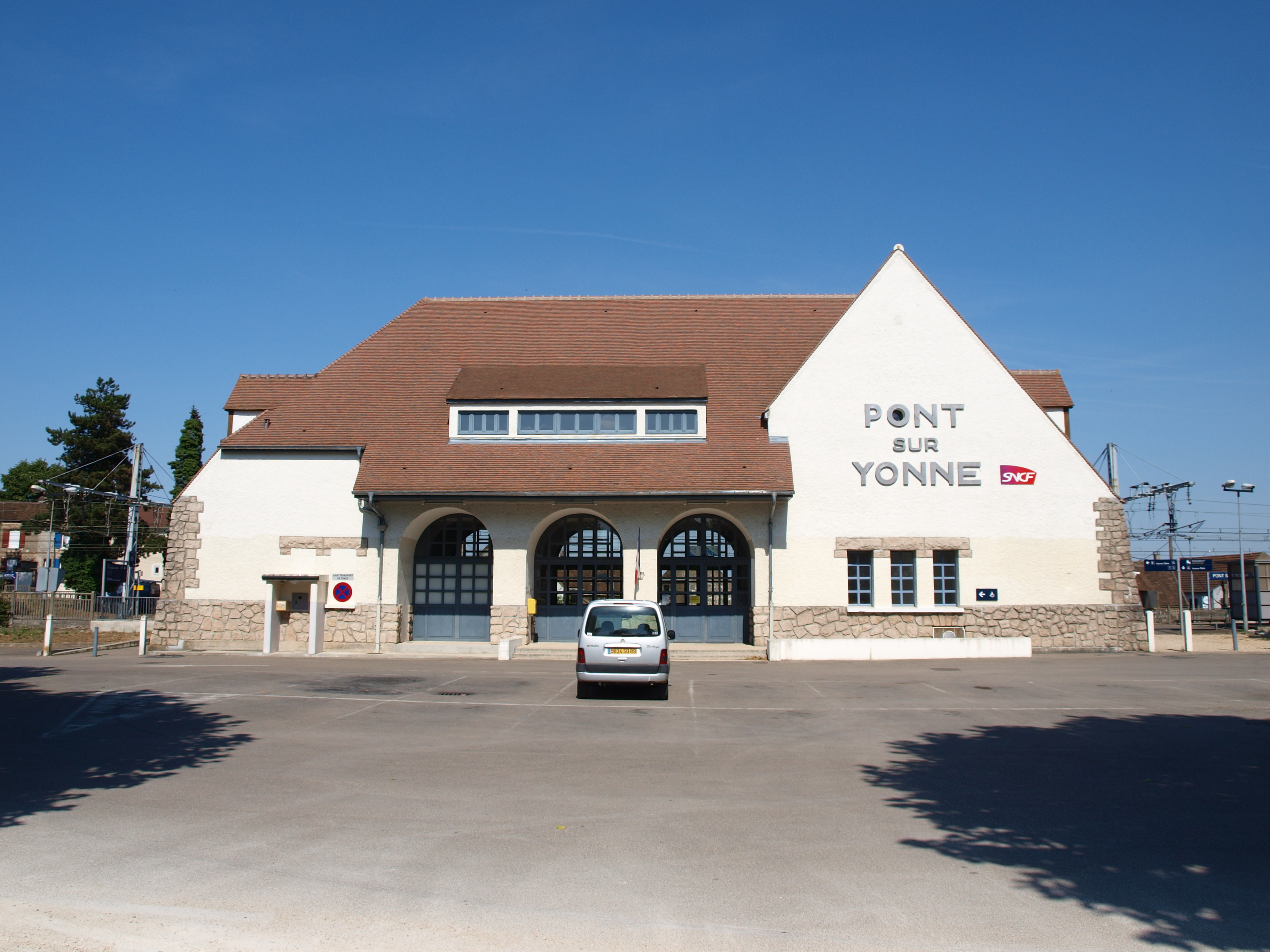 Gare de Pont-sur-Yonne (Yonne, France)